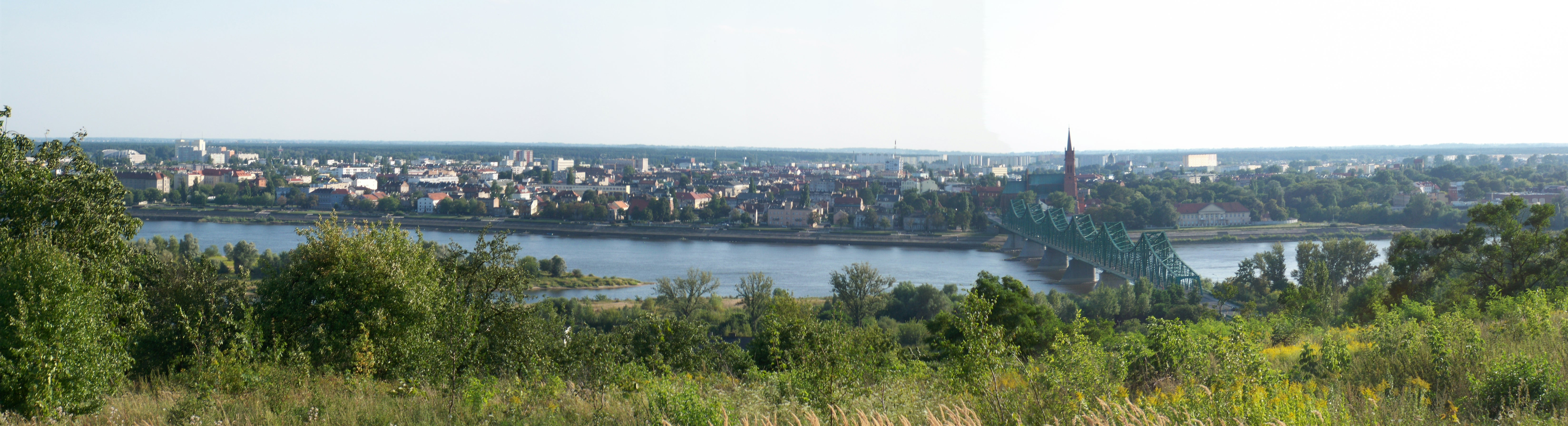 Widok ze Wzgórz Szpetalskich (2009 r.)